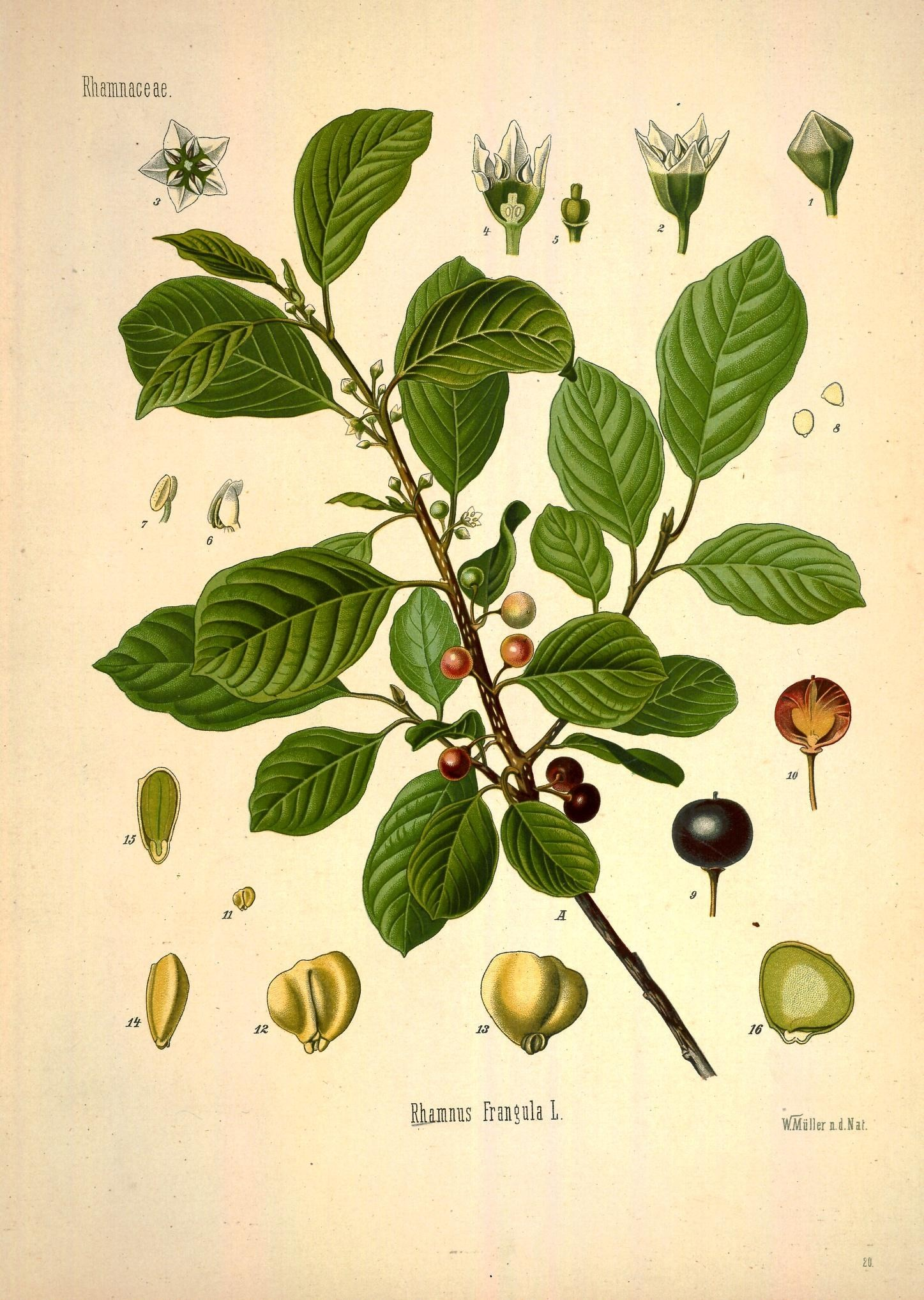 Faulbaum. A Zweig mit Blüthen und Früchten, natürl. Grösse; 1 Blüthenknospe, vergrössert; 2 geöffnete Blüthe von der Seite, desgl.; 3 dieselbe von oben, desgl.; 4 dieselbe im Längsschnitt, desgl.; 5 Fruchtknoten mit Griffel und Narbe, desgl.; 6 u. 7 Staubgefäss, desgl.; 8 Pollenkörner, desgl.; 9 Frucht (Steinbeere), desgl.; 10 dieselbe im Längsschnitt, desgl.; 11, 12, 13, 14 Steinkern von verschiedenen Seiten, natürl. Grösse und vergrössert; 15 u. 16 dasselbe im Längsschnitt, desgl.